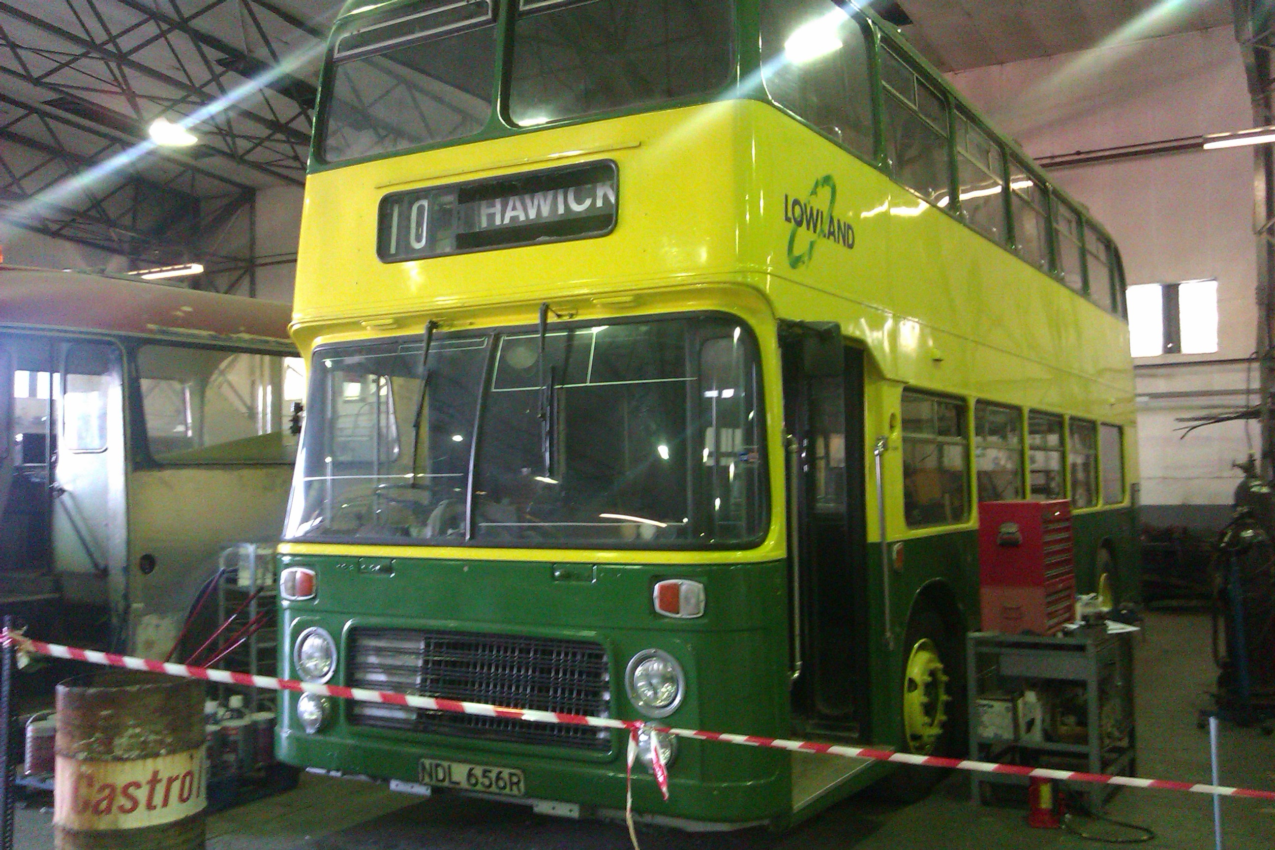 IMAG3052